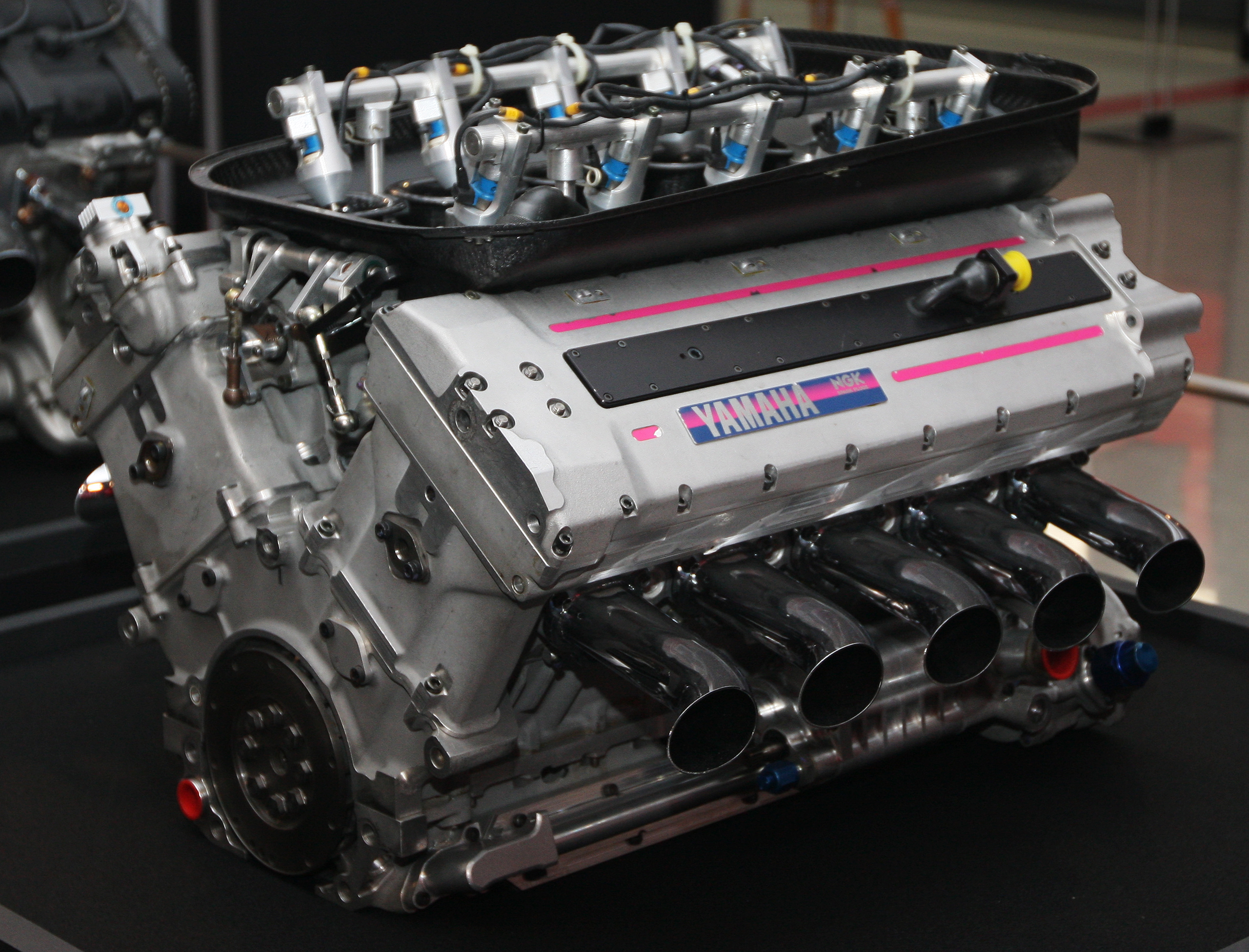 1996–1997 Yamaha OX11A engine